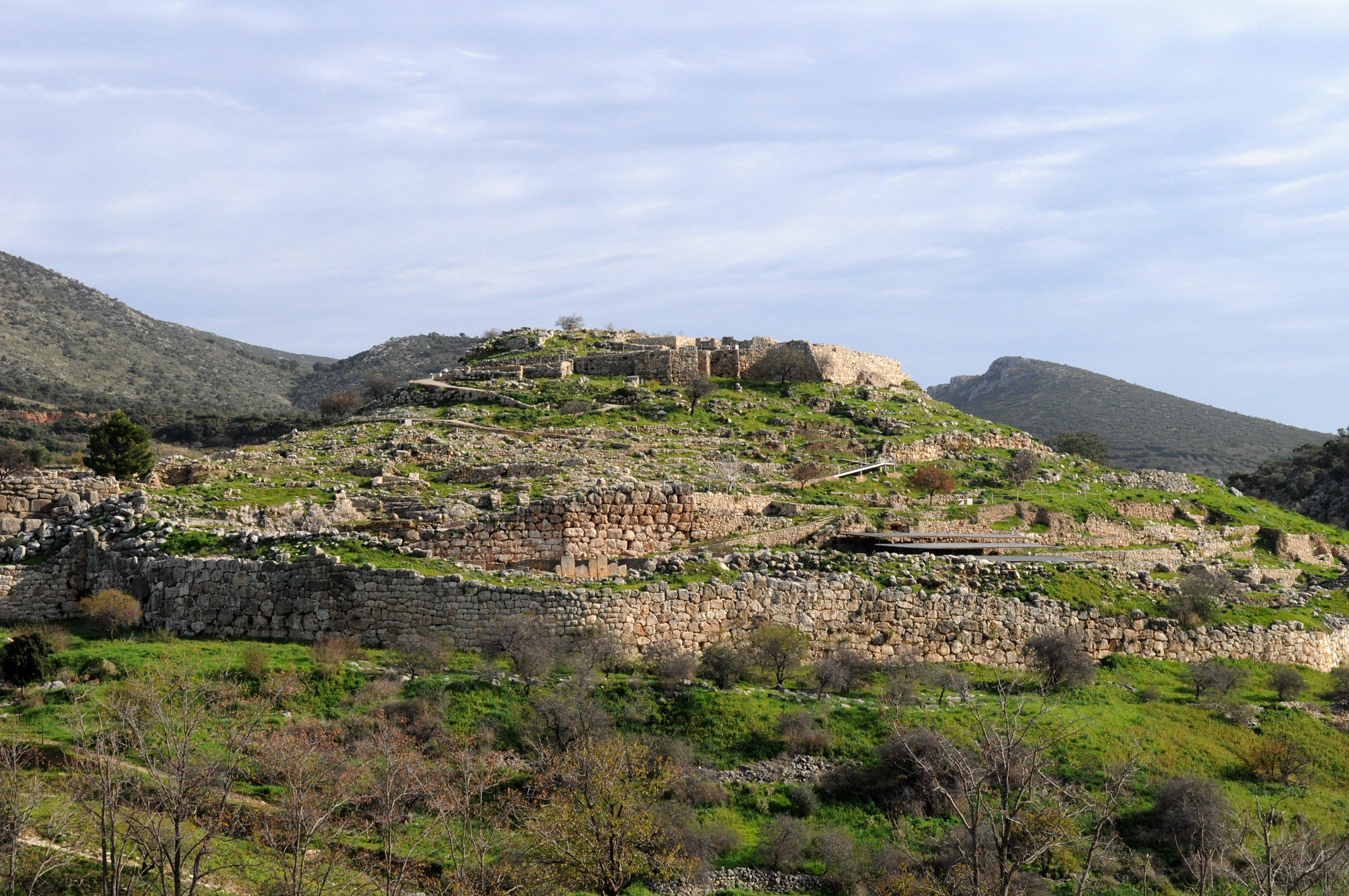 Κυκλώπεια τείχη Μυκηνών«Κυκλώπεια τείχη Μυκηνών»